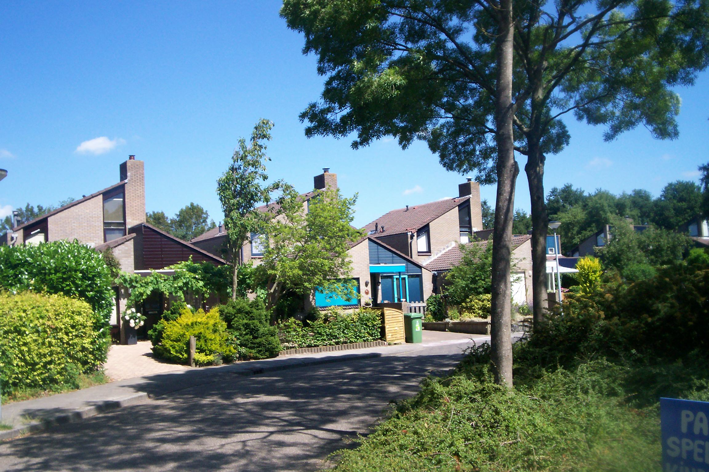 Eigen werk.